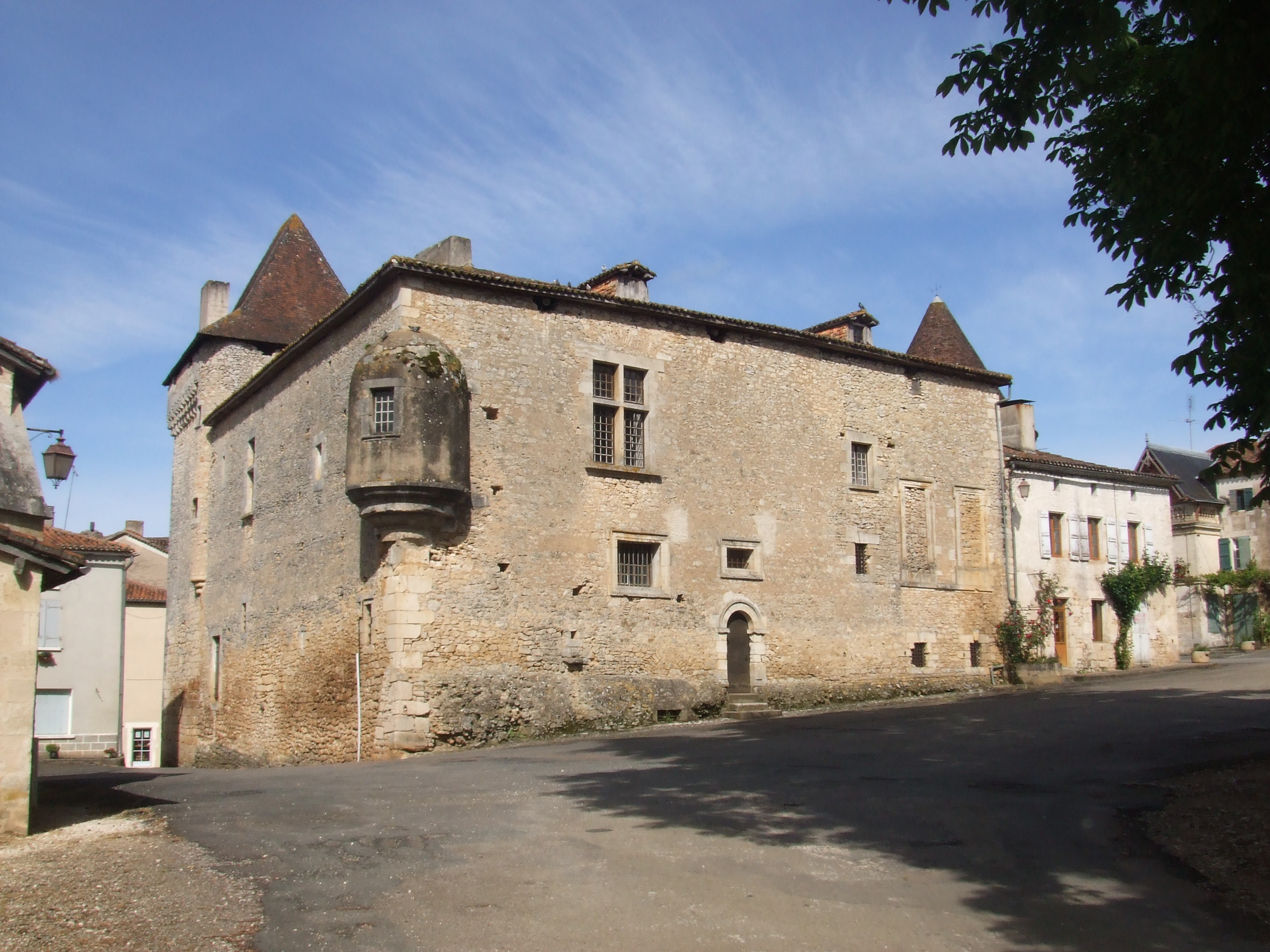 Château de Varaignes, Dordogne, France Object location45° 35′ 52″ N, 0° 31′ 51″ E